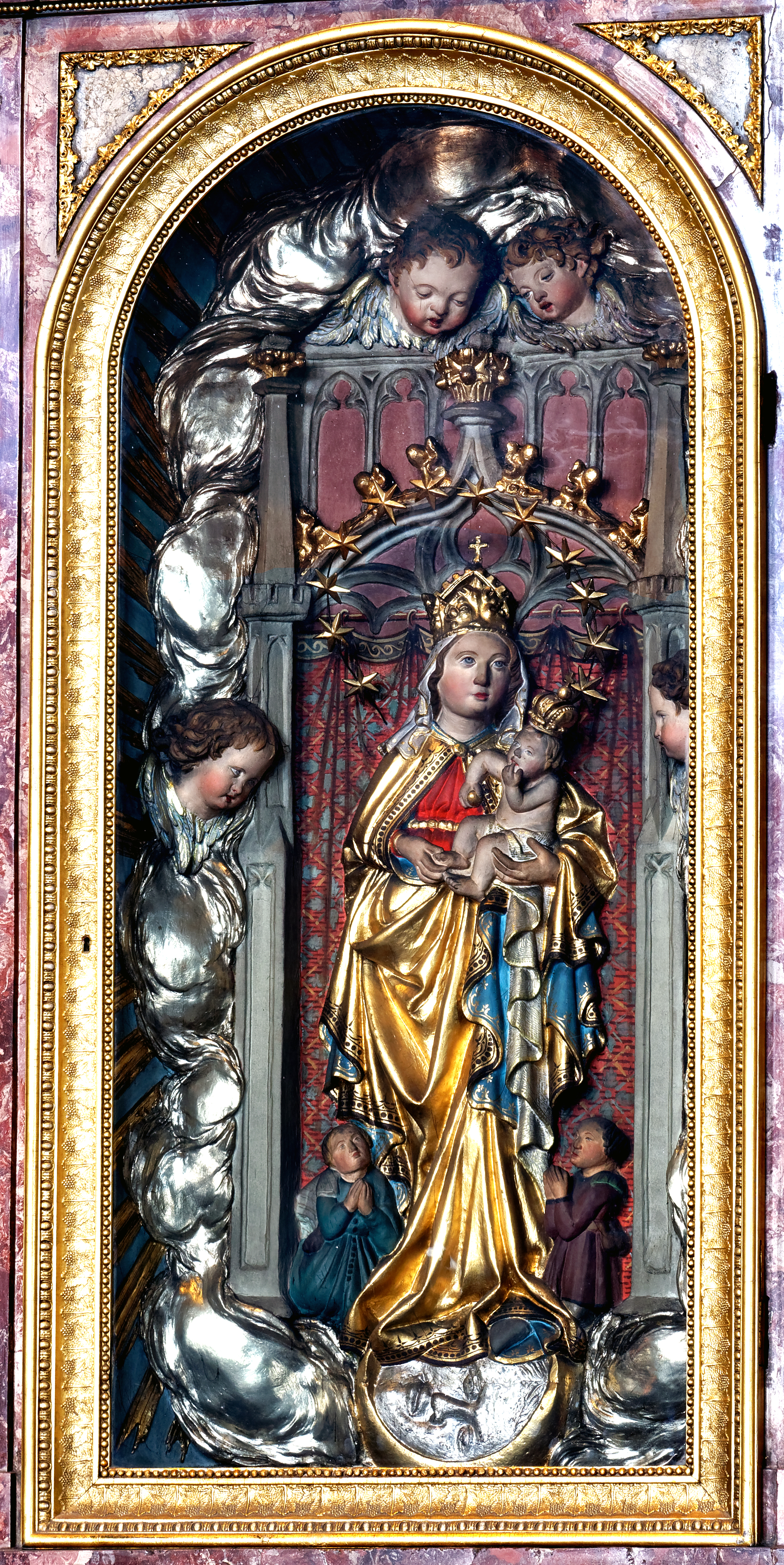 Das Käppele in Würzburg